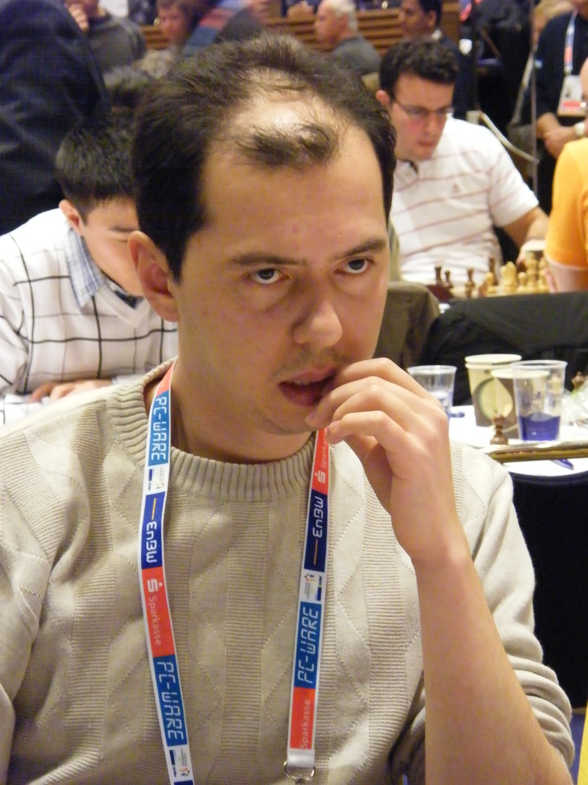 GM Rustam Kasimschanow bei der Schacholympiade 2008 in Dresden